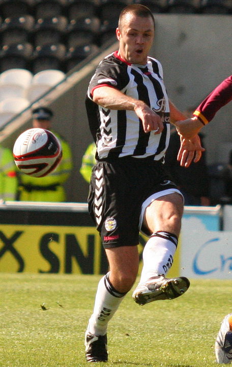 Pass